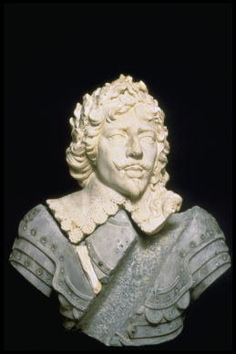 Artus Legoust, Louis XIII, 1620